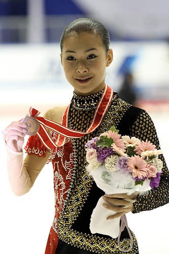 Kanako Murakami at the 2010 NHK Trophy.